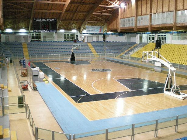 Palazzetto dello sport Ragusa